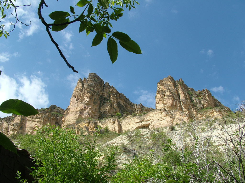 Beypazarı, Ankara